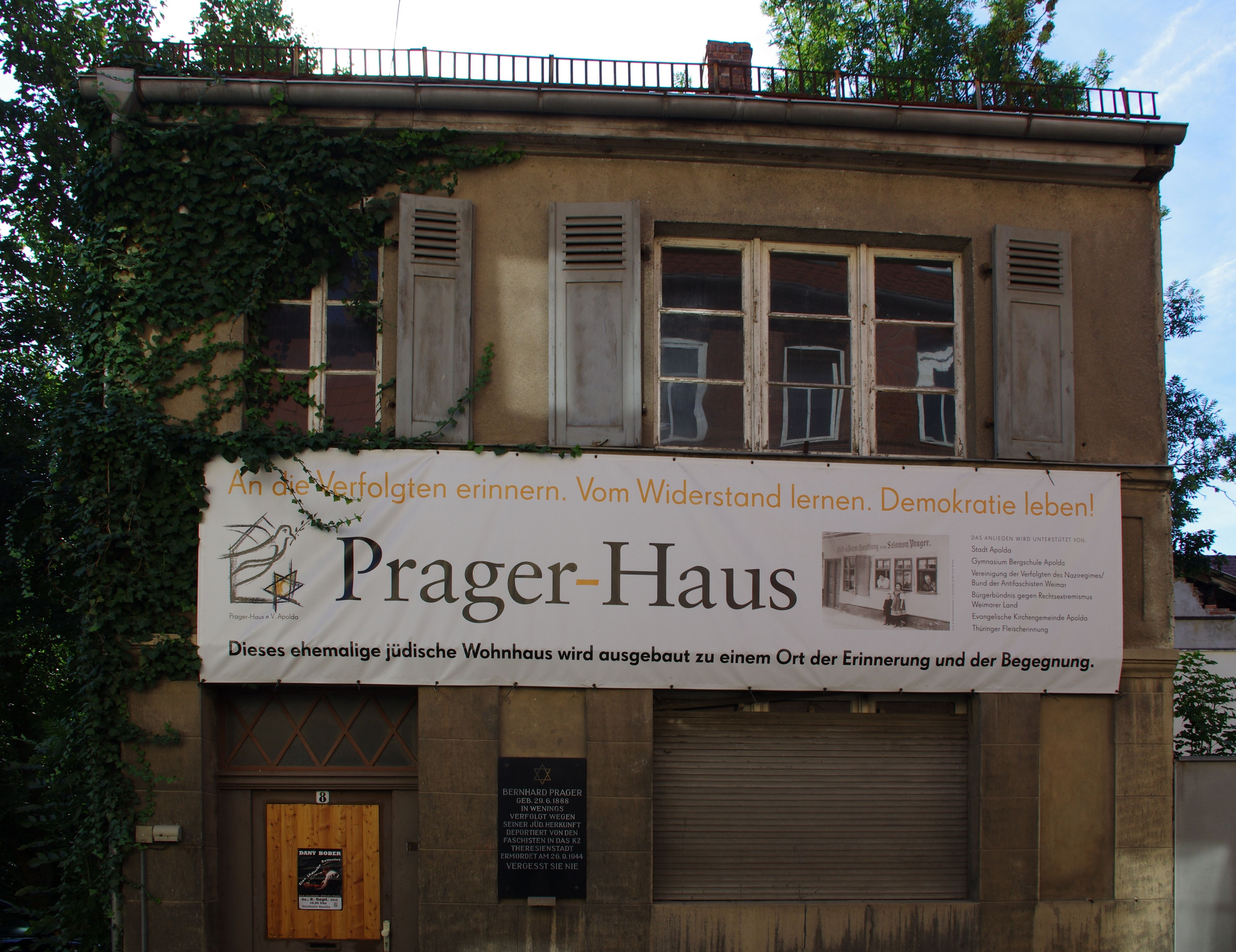 Das Prager Haus in Apolda in Thüringen. Das Haus wurde vor dem Zweiten Weltkrieg von Juden bewohnt. Das Haus soll eine Denkstätte werden.